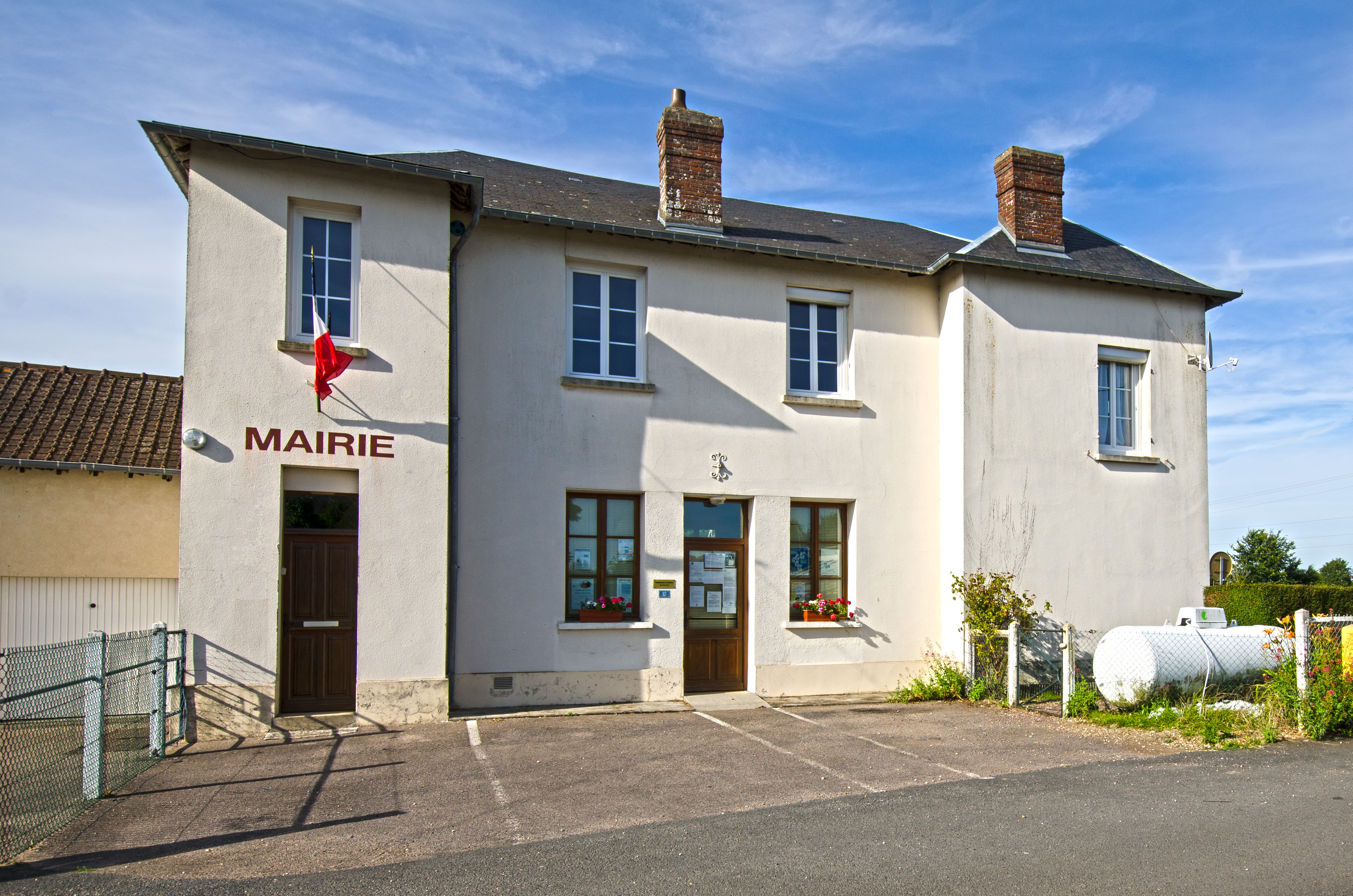 Vue sur la Mairie